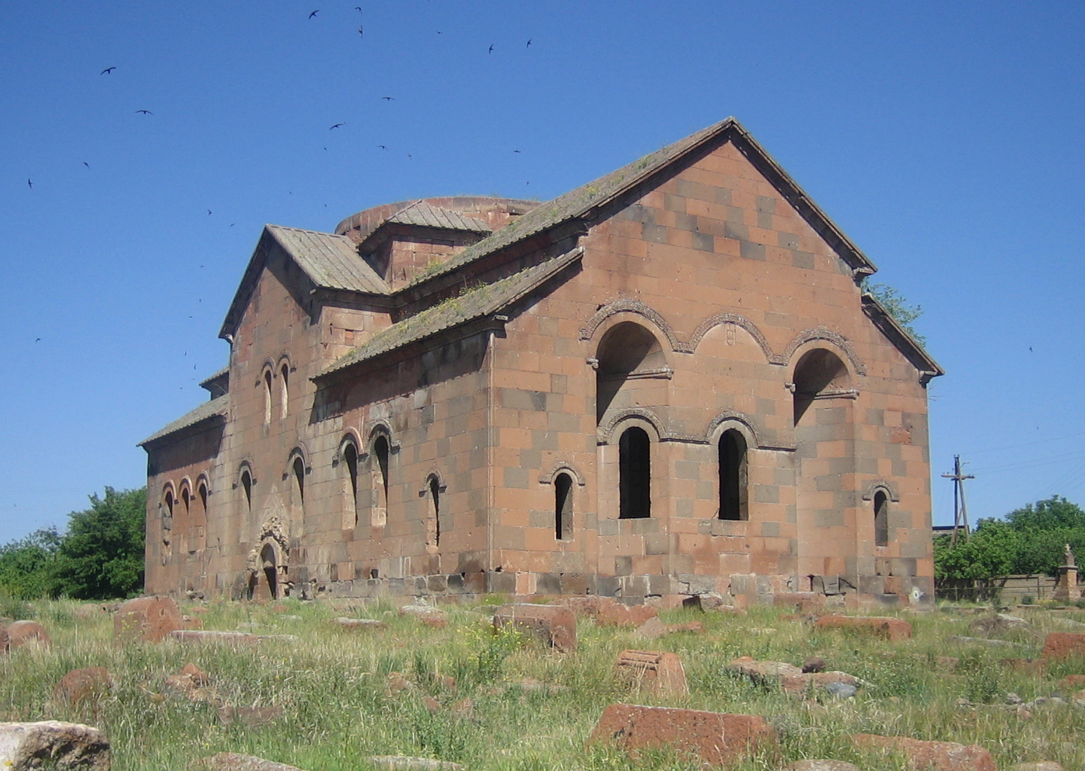 Monasterio de Aruchavank (Armenia)